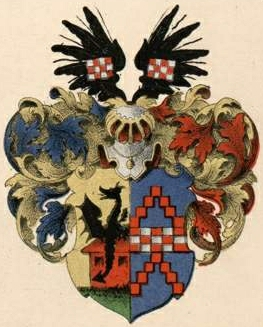 Wistinghauseni suguvõsa aadlivapp